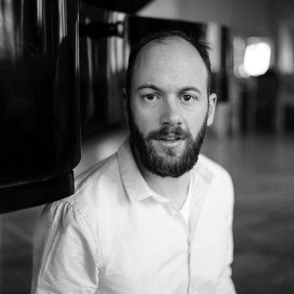 David Six, photo by Theresa Pewal